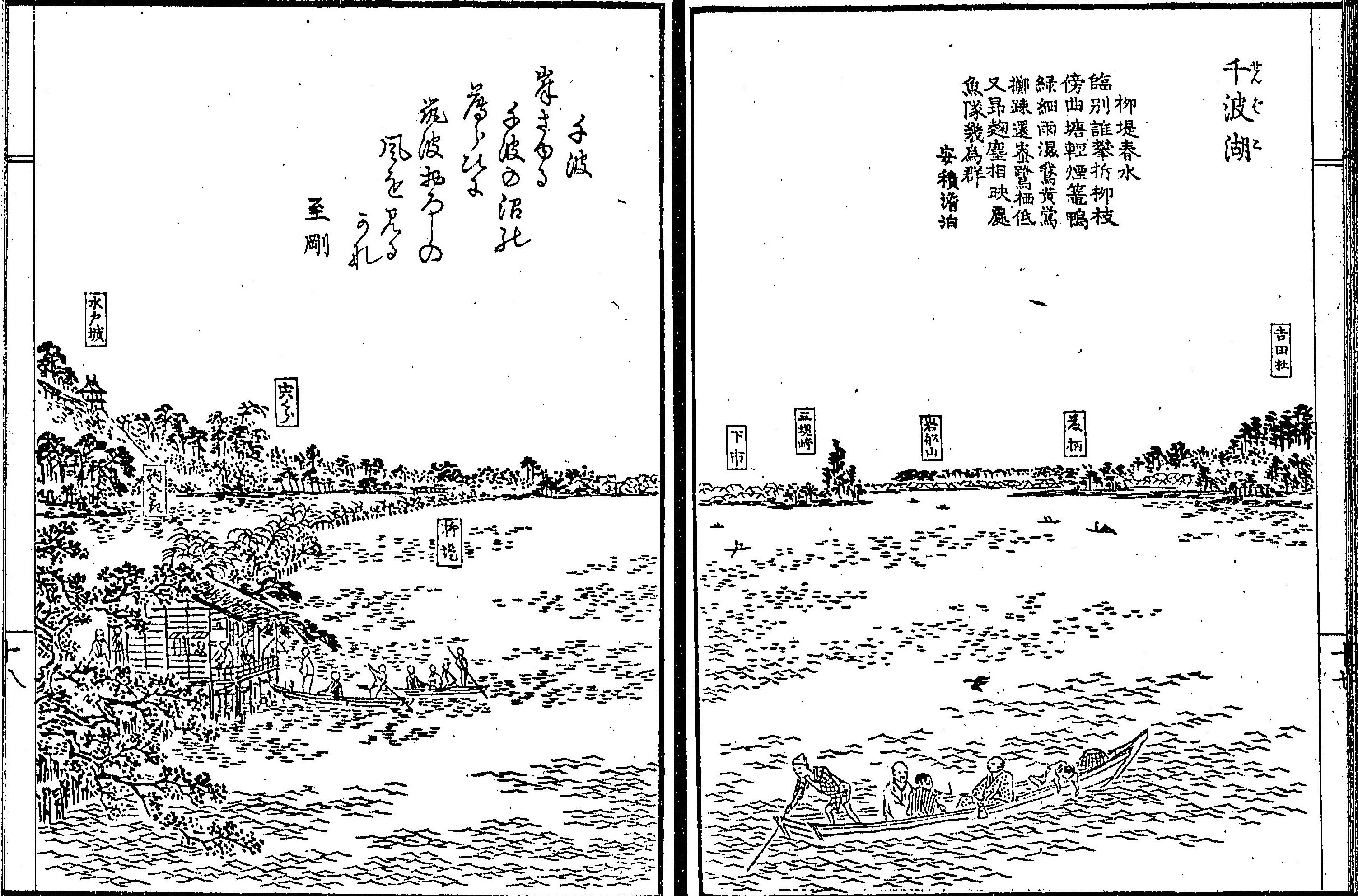 千波湖の図(『茨城常盤公園攬勝図誌』松平俊雄 著 YDM23693 (マイクロフィッシュ) )コマ番号71 改編 国立国会図書館デジタルコレクション:インターネット公開（保護期間満了）